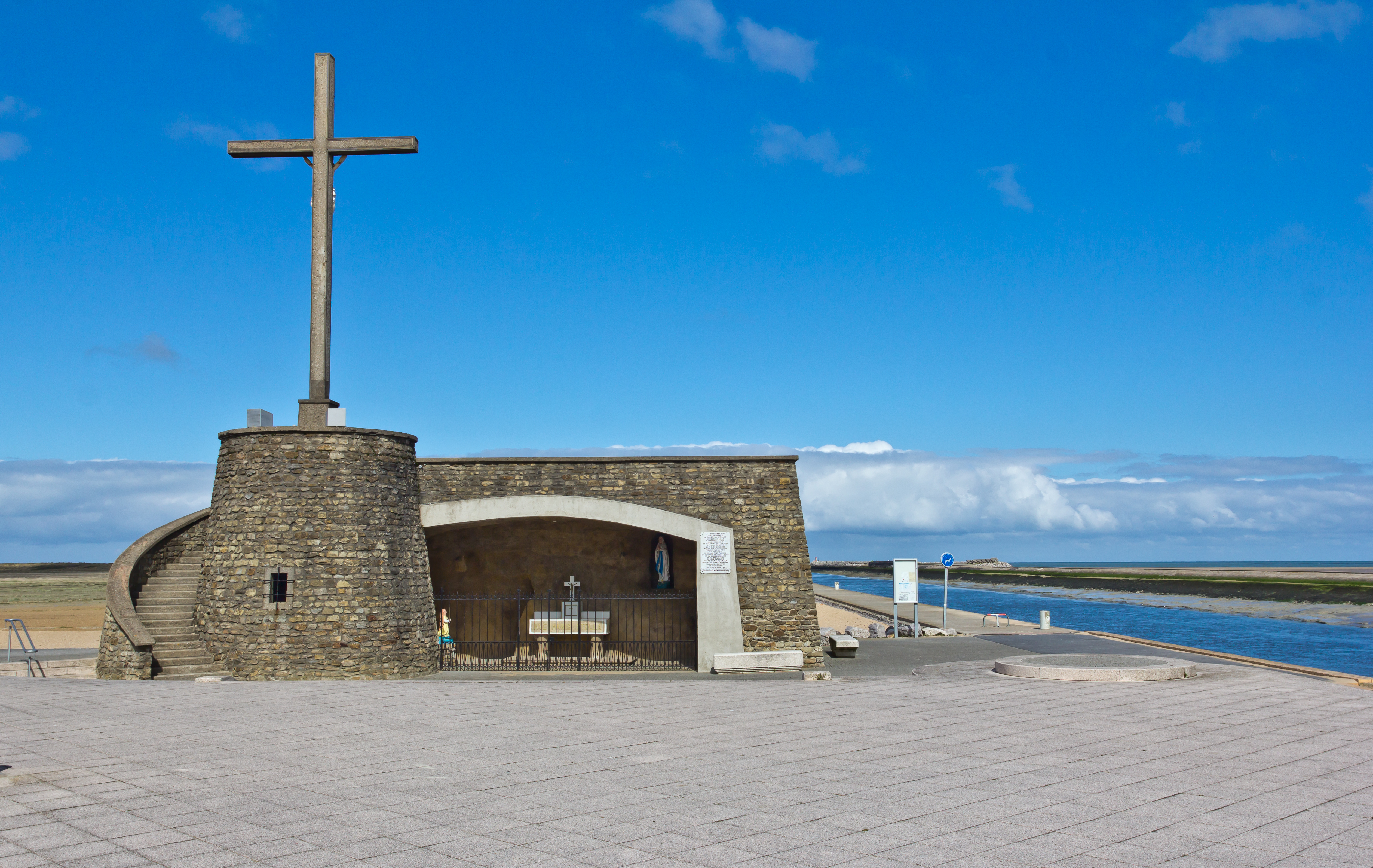 Calvaire des marins de Grand-Fort-Philippe, Gravelines